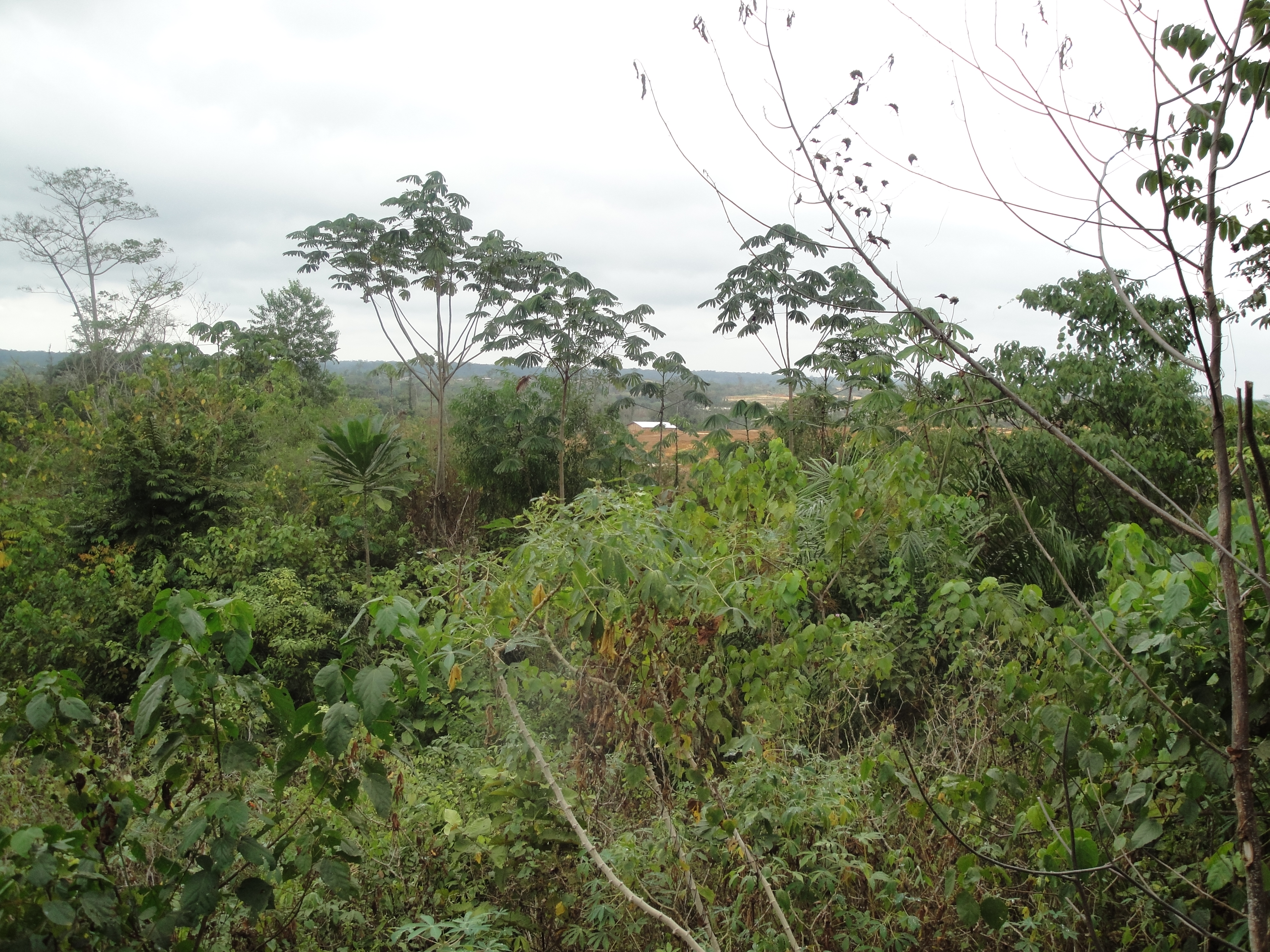 végétation luxuriante aux portes de Libreville, au Gabon